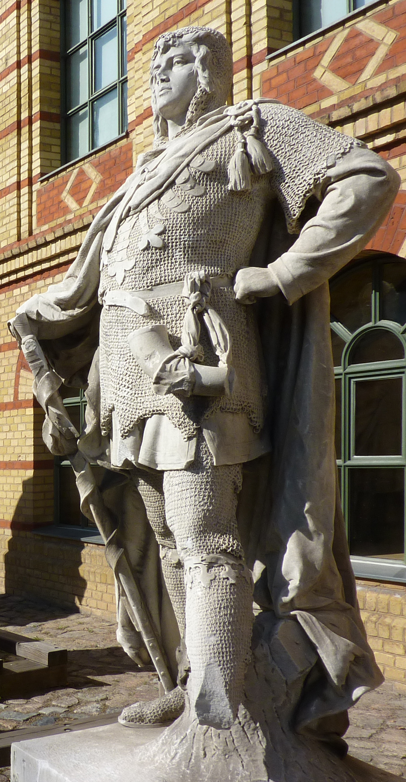 Siegesallee Gruppe 2 Otto I., enthüllt 1898, Plastiker Max Unger, Standort zZ Zitadelle Spandau